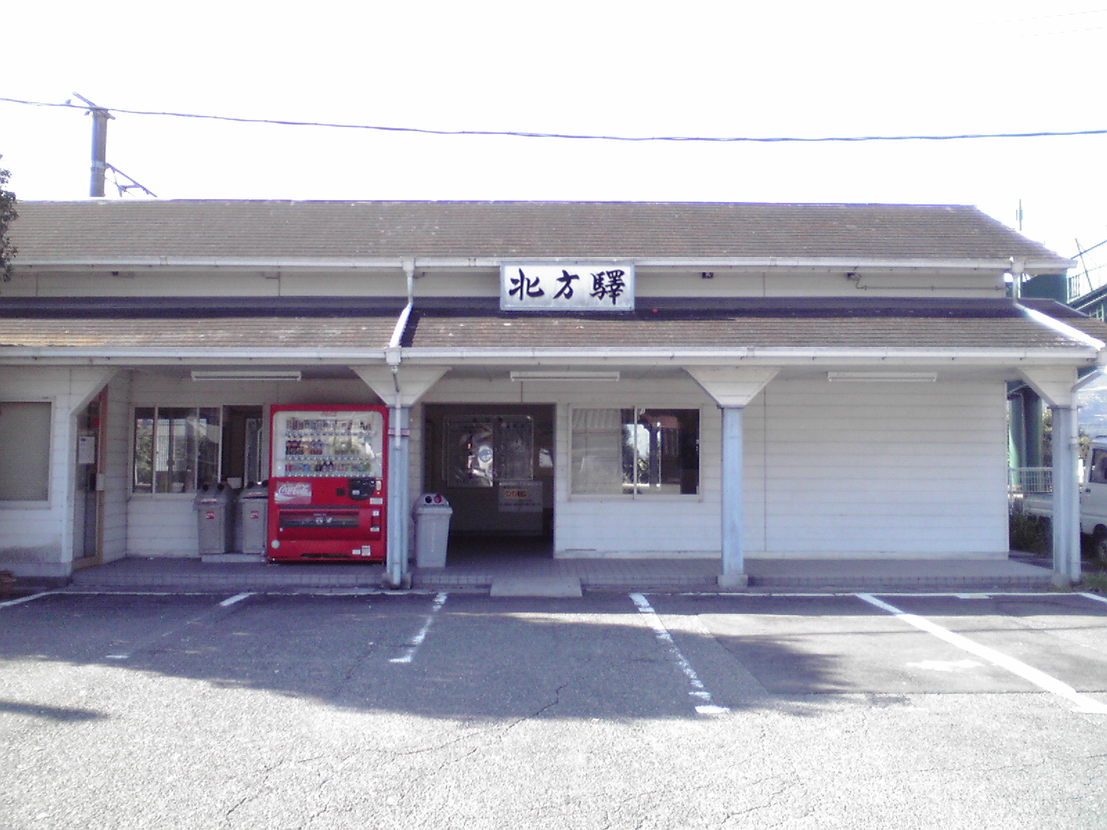 JR佐世保線北方駅